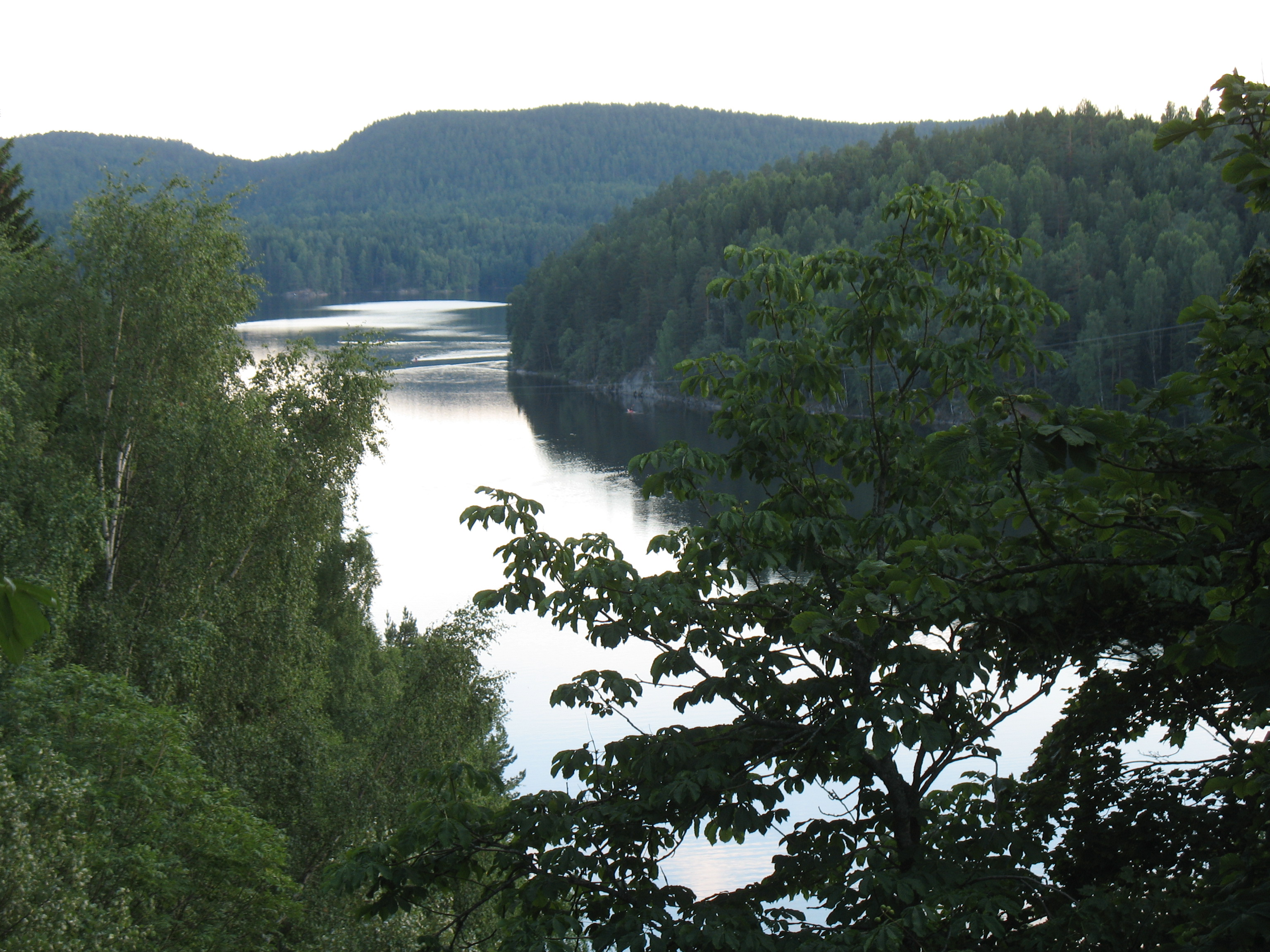 Nøklevann i Østmarka i Oslo, sett fra Sarabråten.